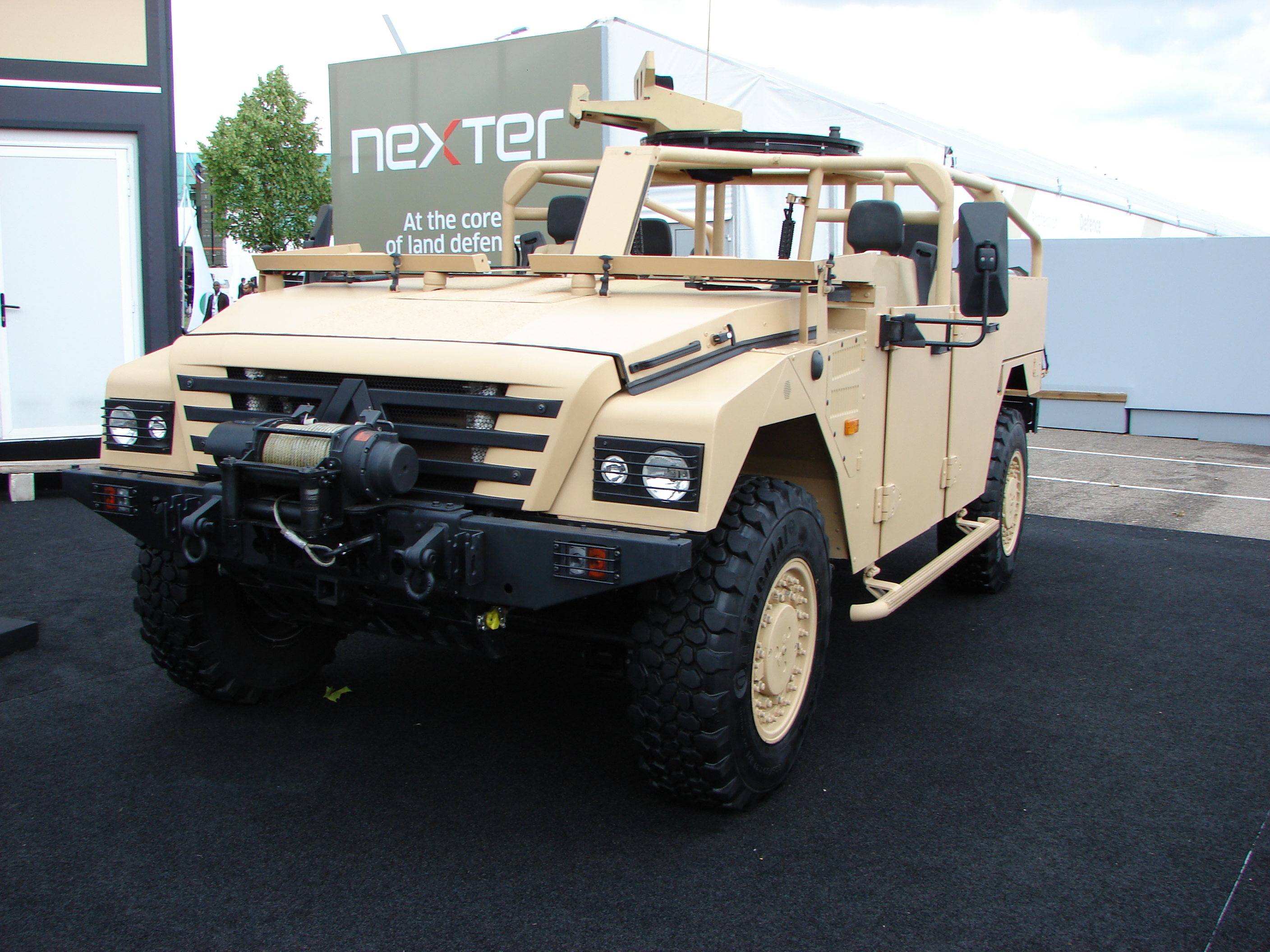 Renault Trucks Defense à Eurosatory 2012